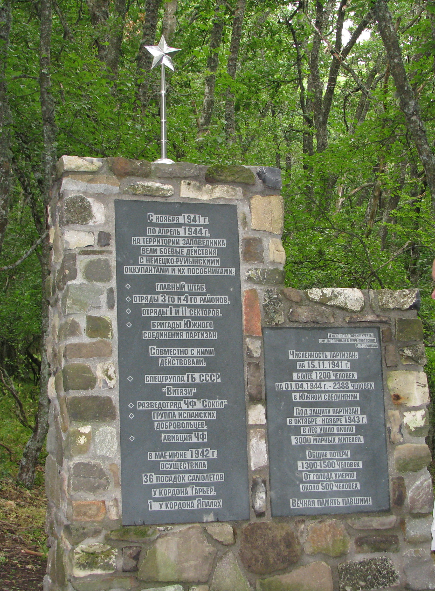 Стела у въезда в Крымский заповедник на перевале Кебит-Багаз. Перечислены все партизанские отряды и соединения, разведотряды и авиагруппы снабжения, которые вели борьбу в заповеднике с 1941 по 1944 годы.